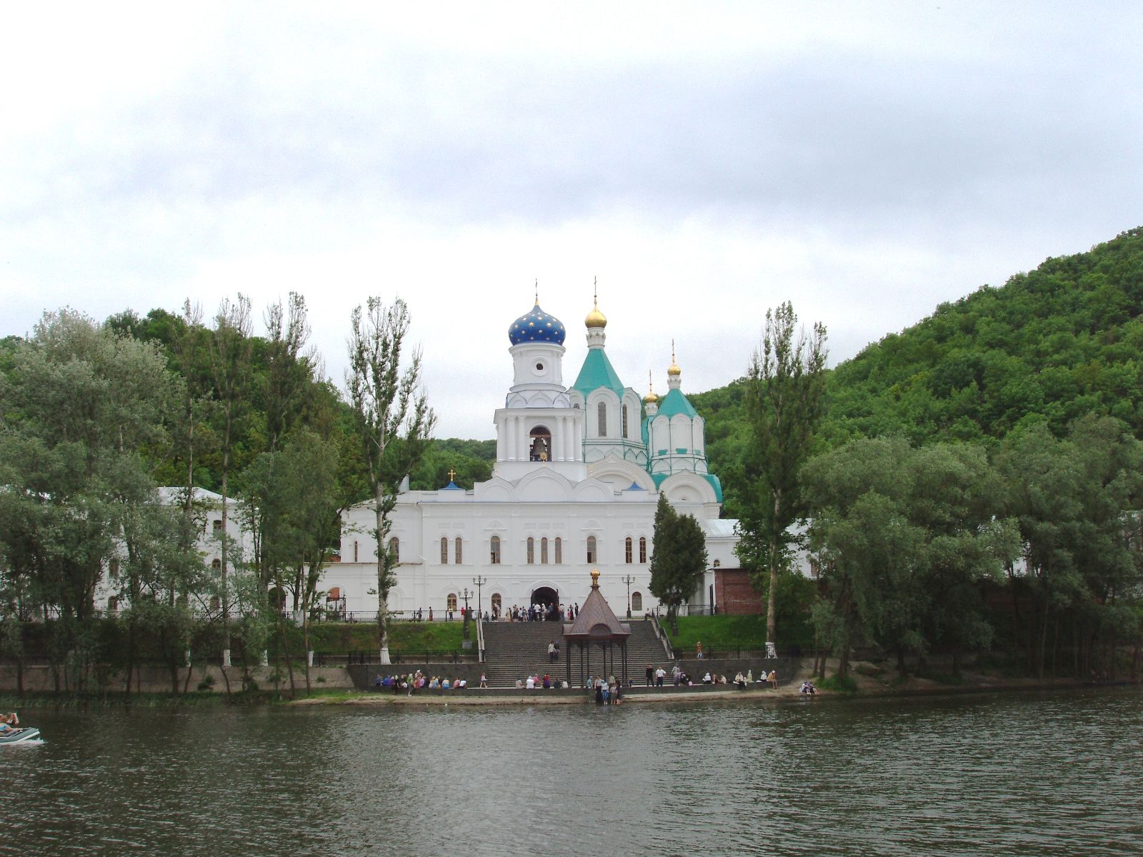 Святогірський монастир